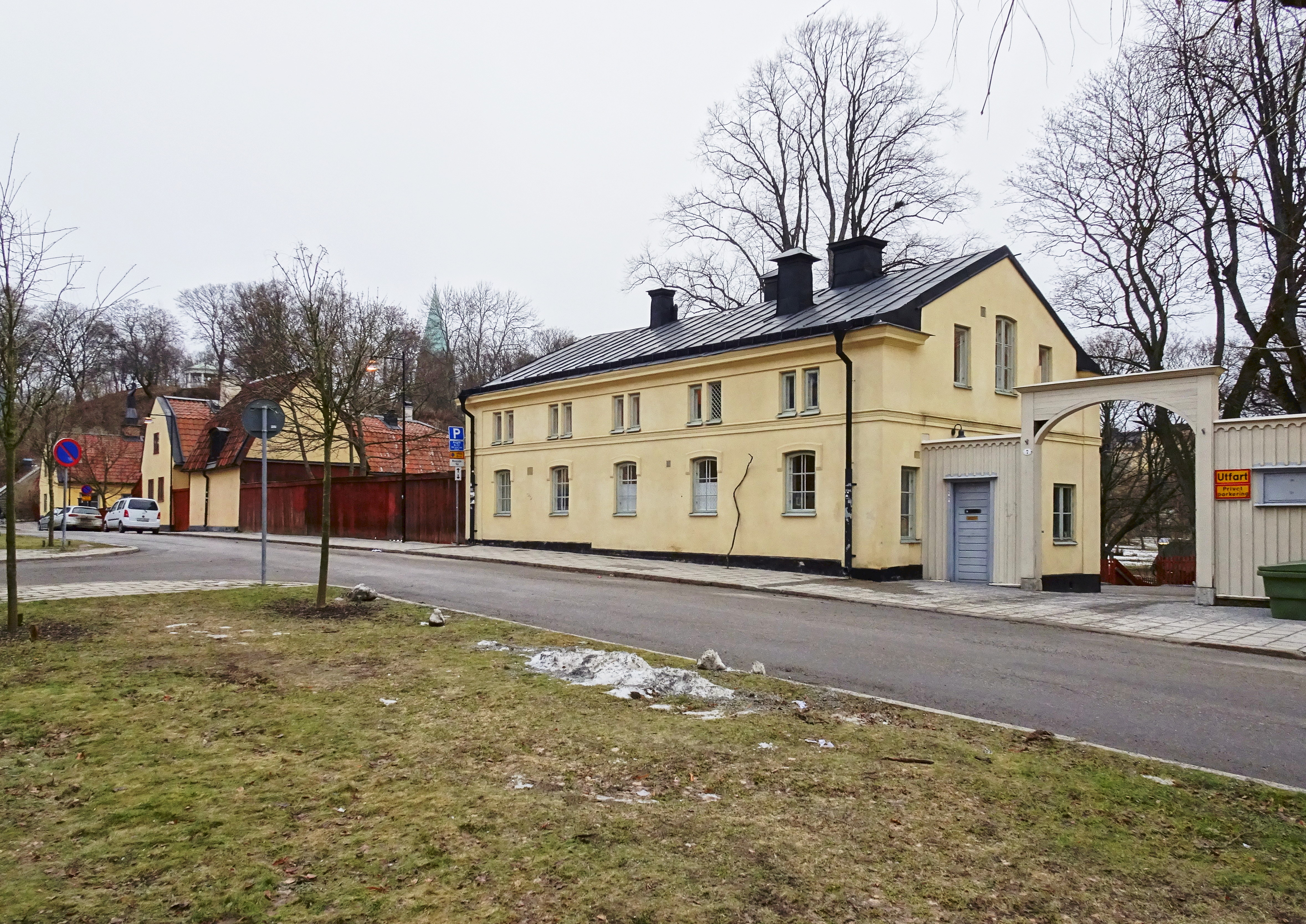 Gaveliusgatan 7, Sofia ungdomshem. Tidigare Barnängens flickhem (1779). Johan Wilhelm Elvies (Arkitekt).